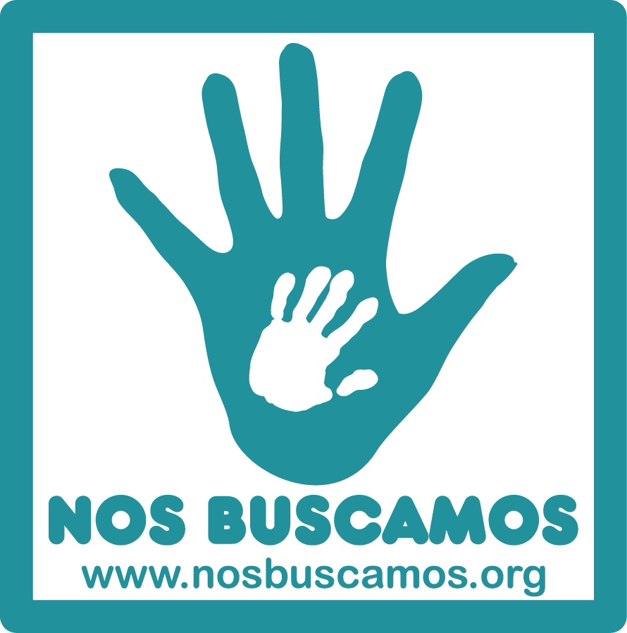 ngo nos buscamos